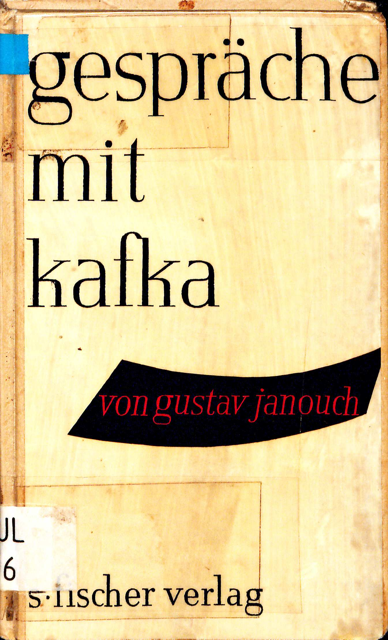 Gustav Janouch: Gespräche mit Kafka. Fischer, Frankfurt a.M. 1951. Deutsche Erstausgabe